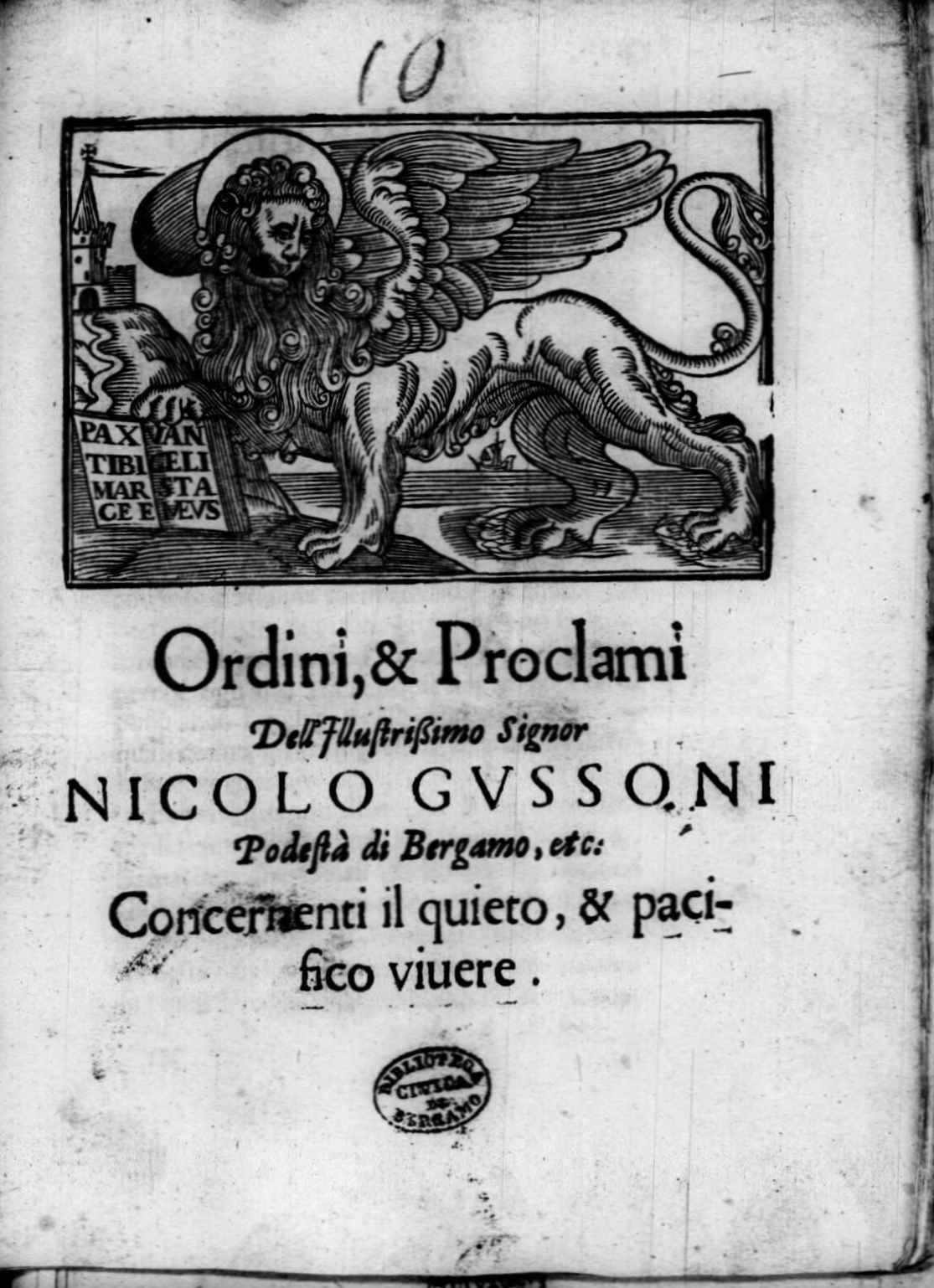 Frontespizio